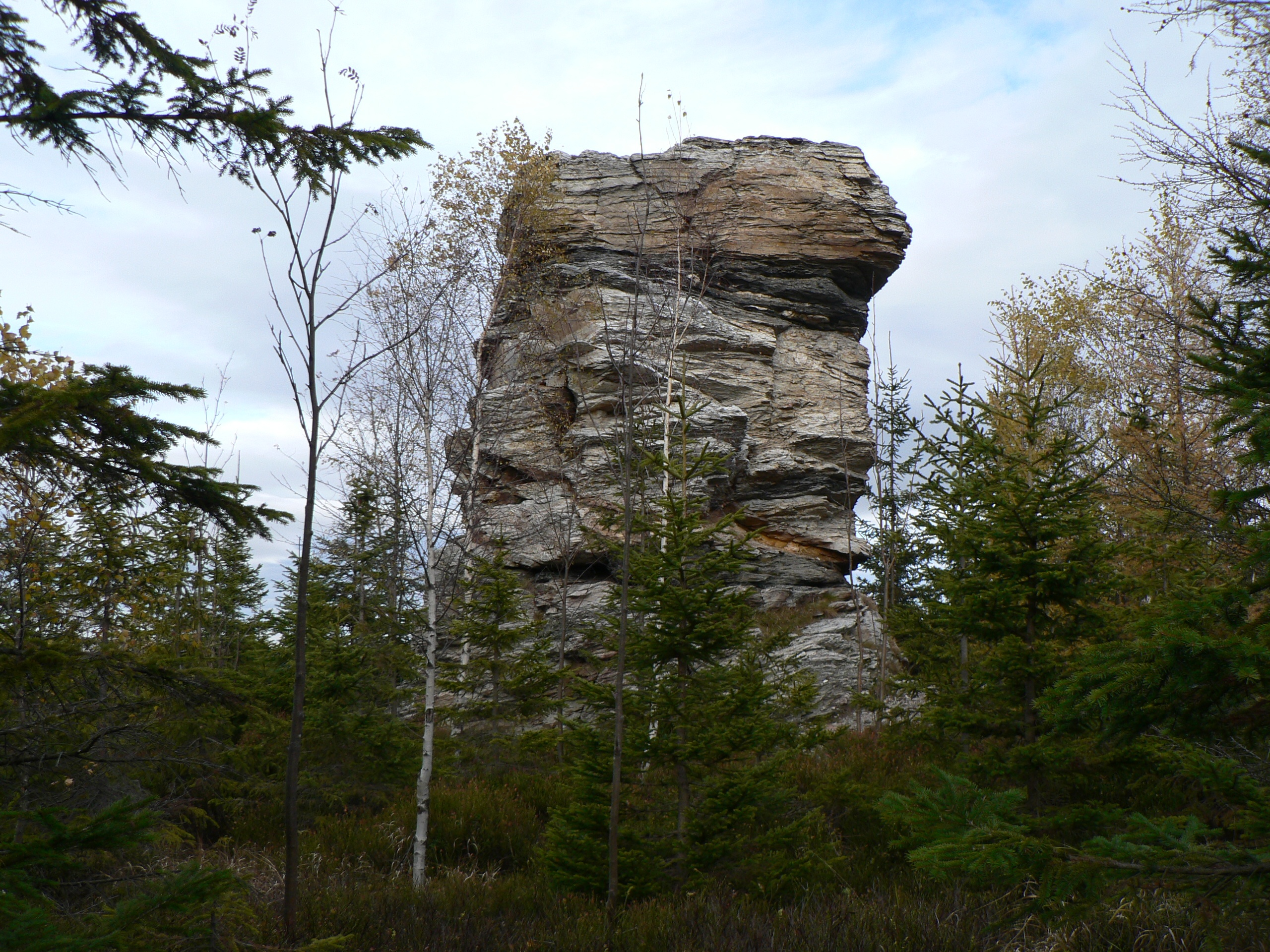 Jedna ze skal na vrcholu Kazatelny